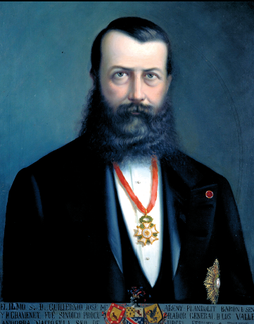 Retrat de Guillem d'Areny-Plandolit, impulsor de la Nova Reforma.